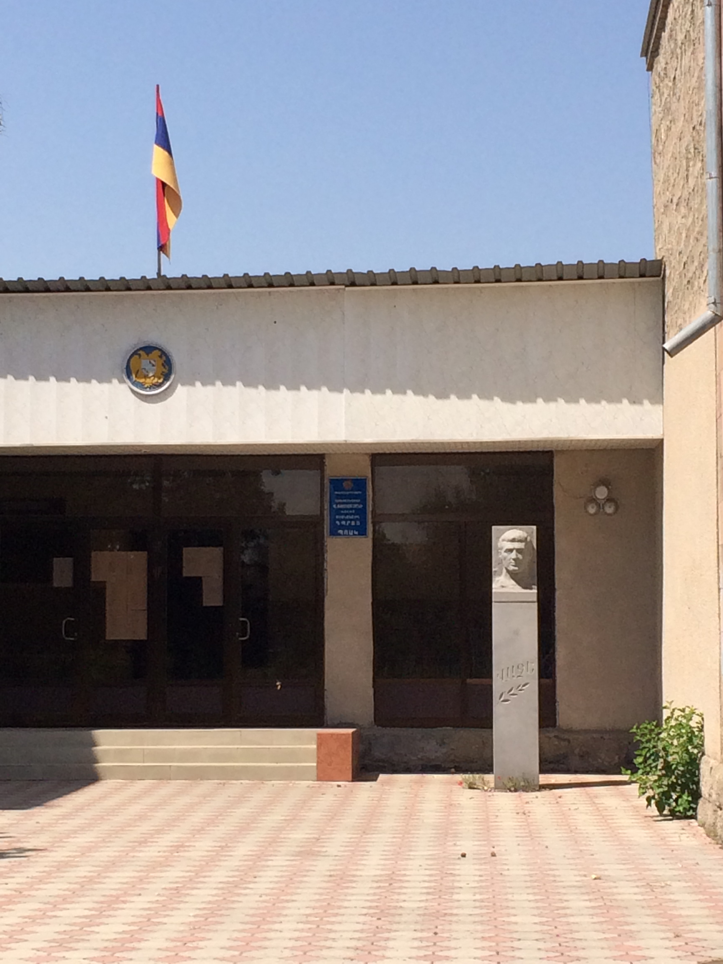 Վաչեի կիսանդրին